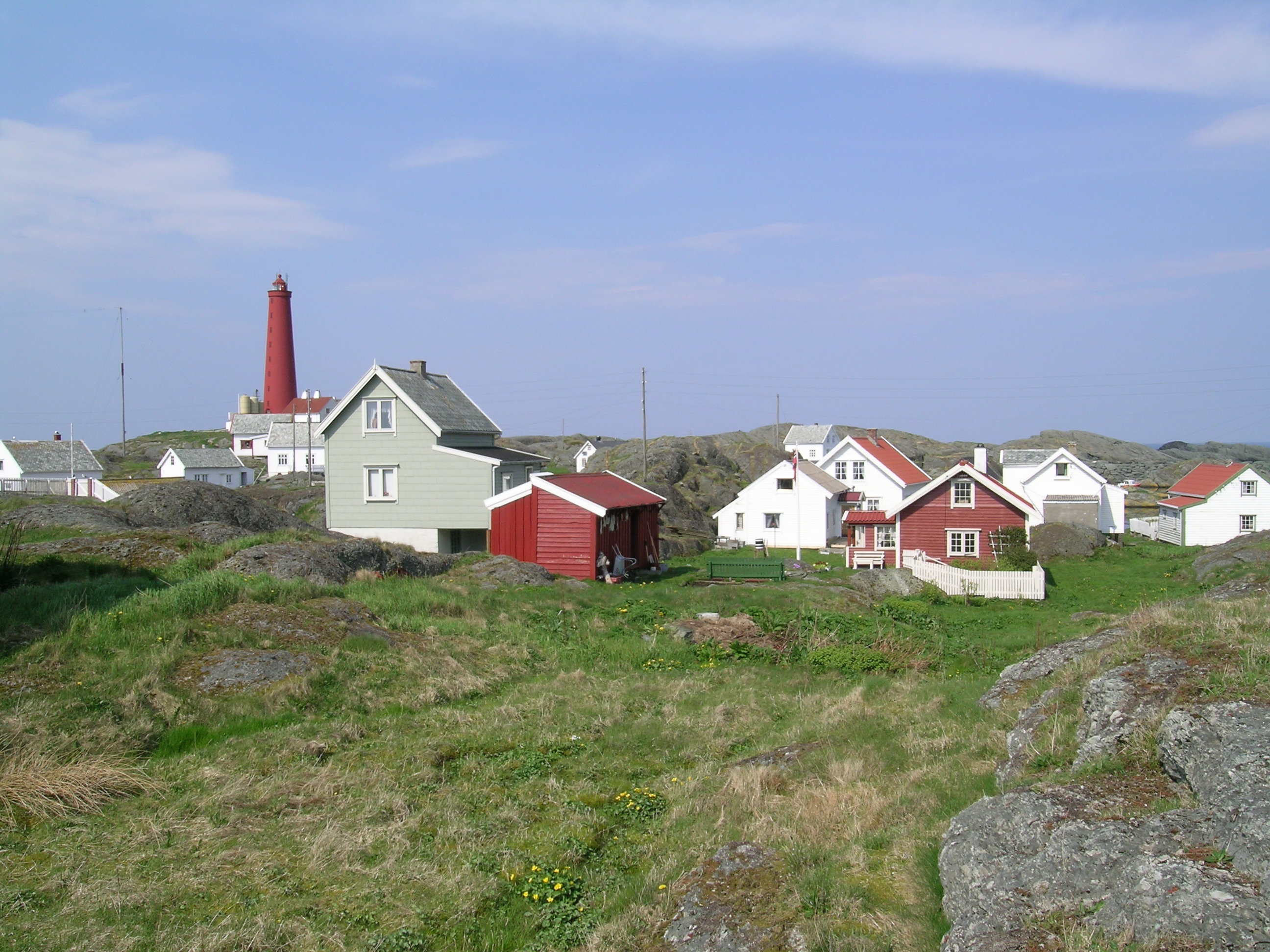 Utvær fyr eller Utvær fyrstasjon ligger i Solund kommune i Sogn og Fjordane. Utvær er det vestligste punktet i Norge, og ligger på øygruppa Utvær, et fredet naturreservat. Fyret har et rødt fyrtårn med lyskilde 45 m.o.h.